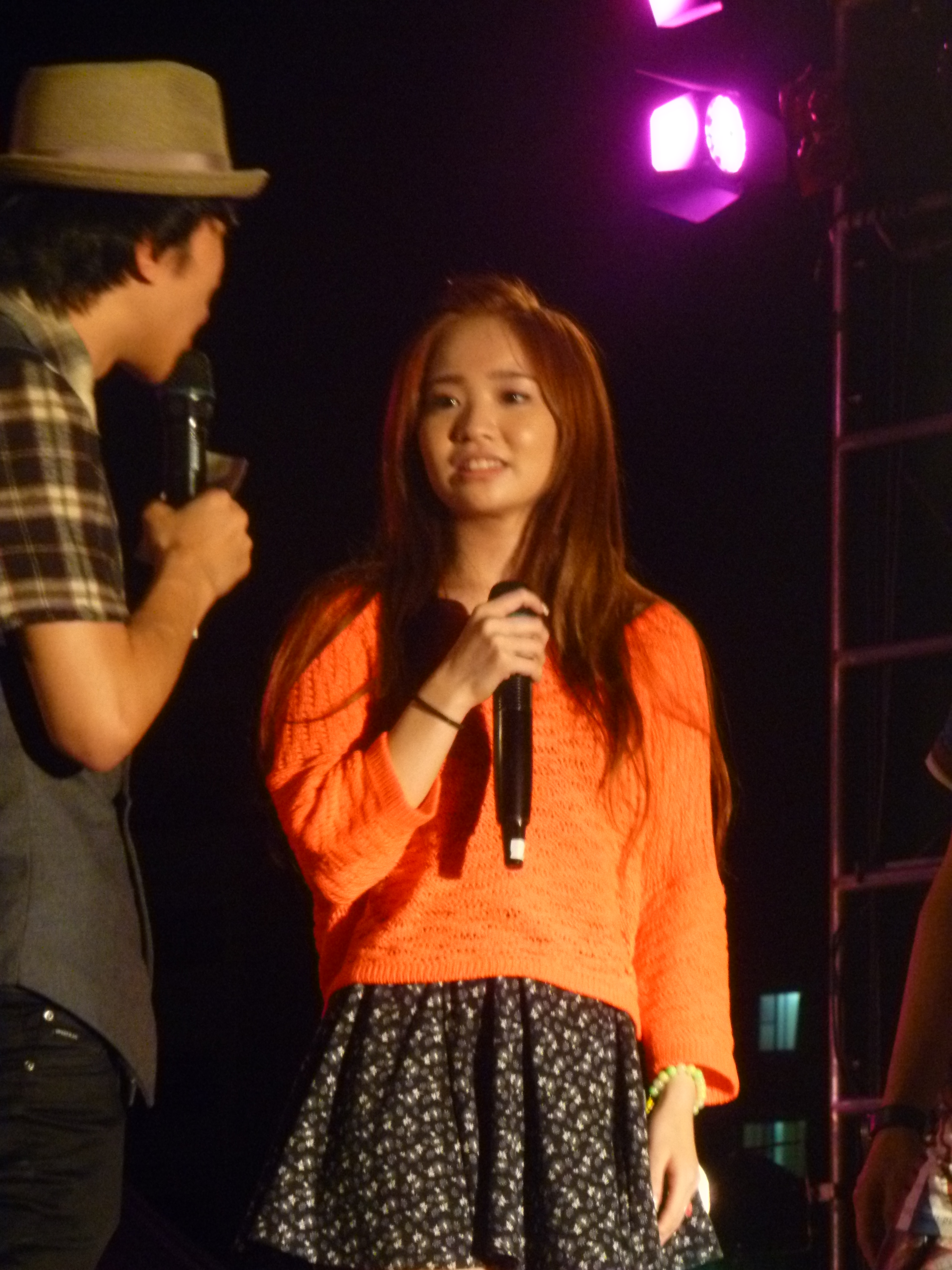 Kimberley陳芳語在南台科大《Maybe》畢業演唱會